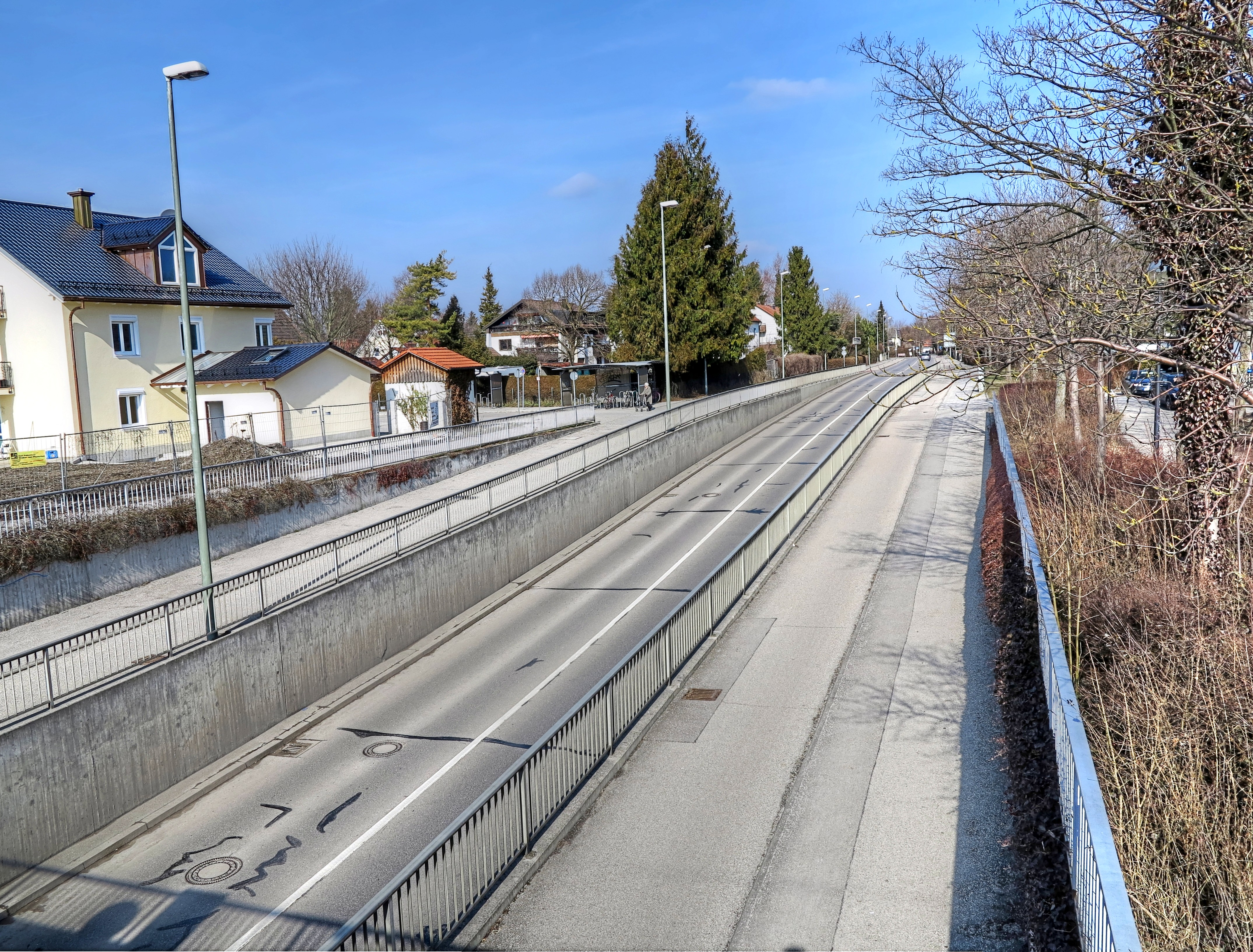 Deutschland, Bayern, Oberbayern, Landkreis Fürstenfeldbruck, Gröbenzell, Bahnunterführung in der Freyastraße